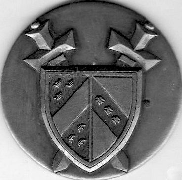 Les armes de la Brigade Alsace Lorraine